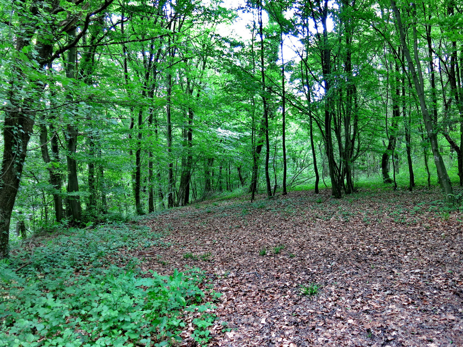 NSG-Nr. 2.057, Ersinger Springenhalde, Heuweg